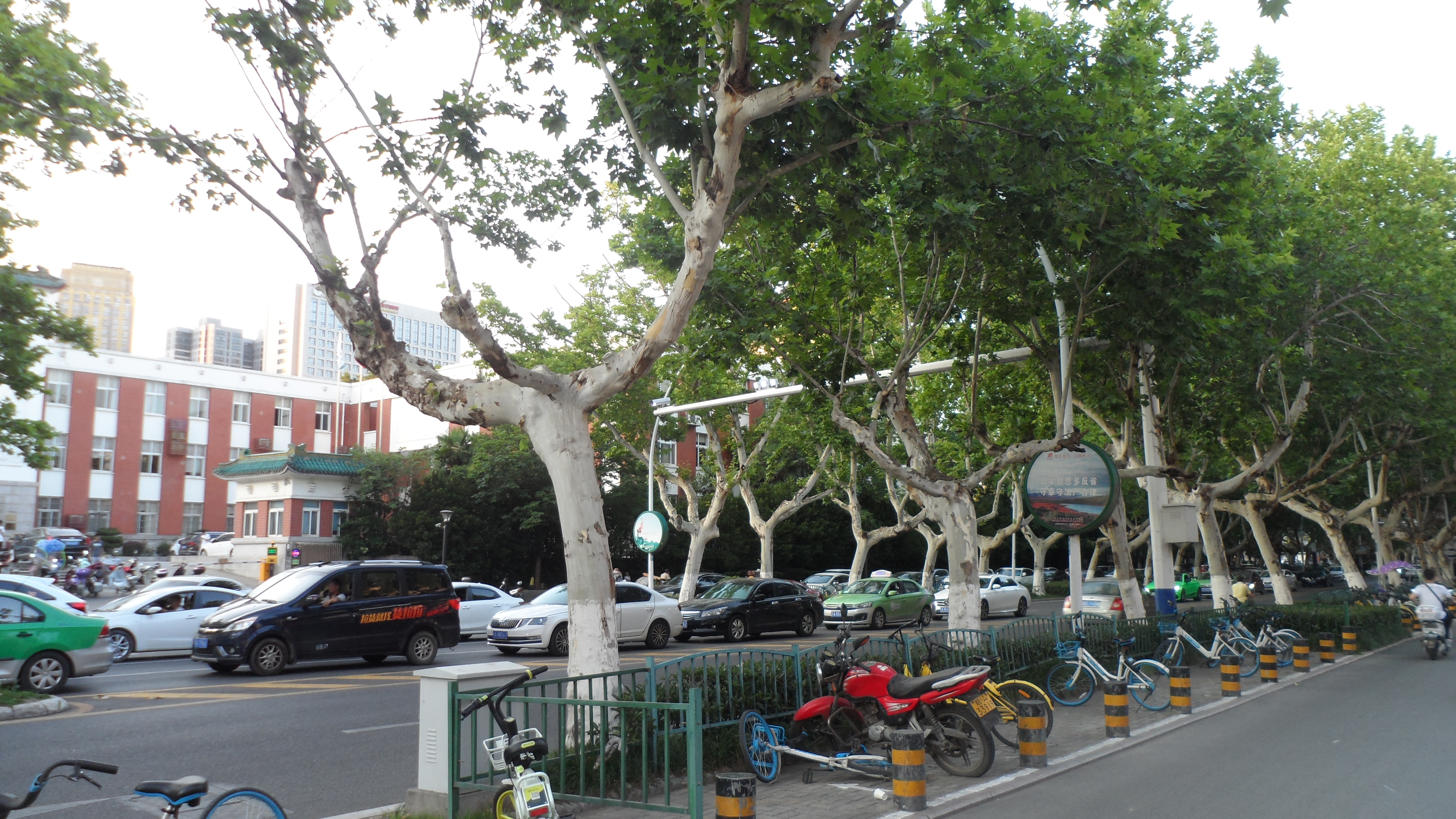 合肥芜湖路